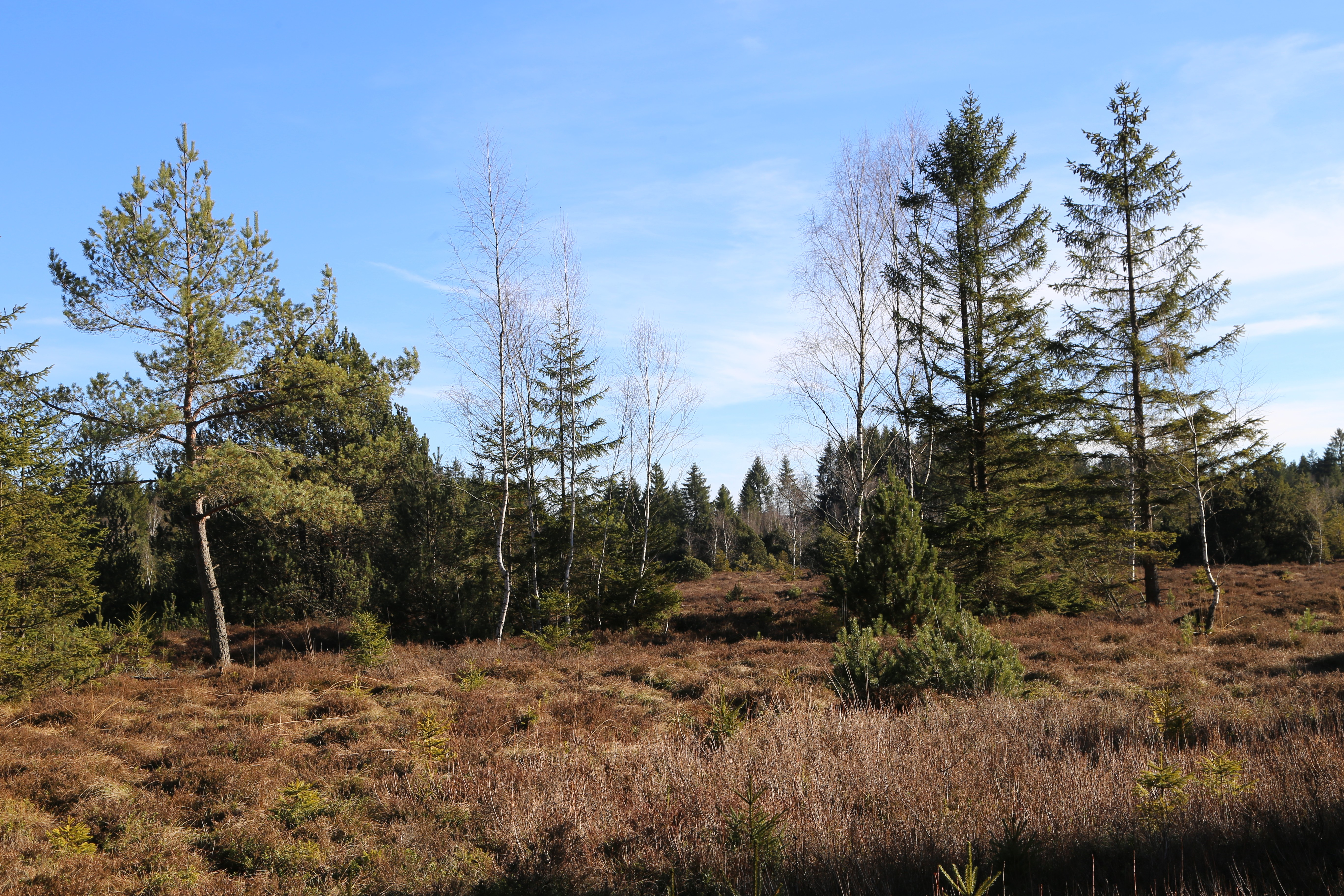 Landschaftsschutzgebiet Ebenbergfilze (LSG-00329.01), Dietramszell